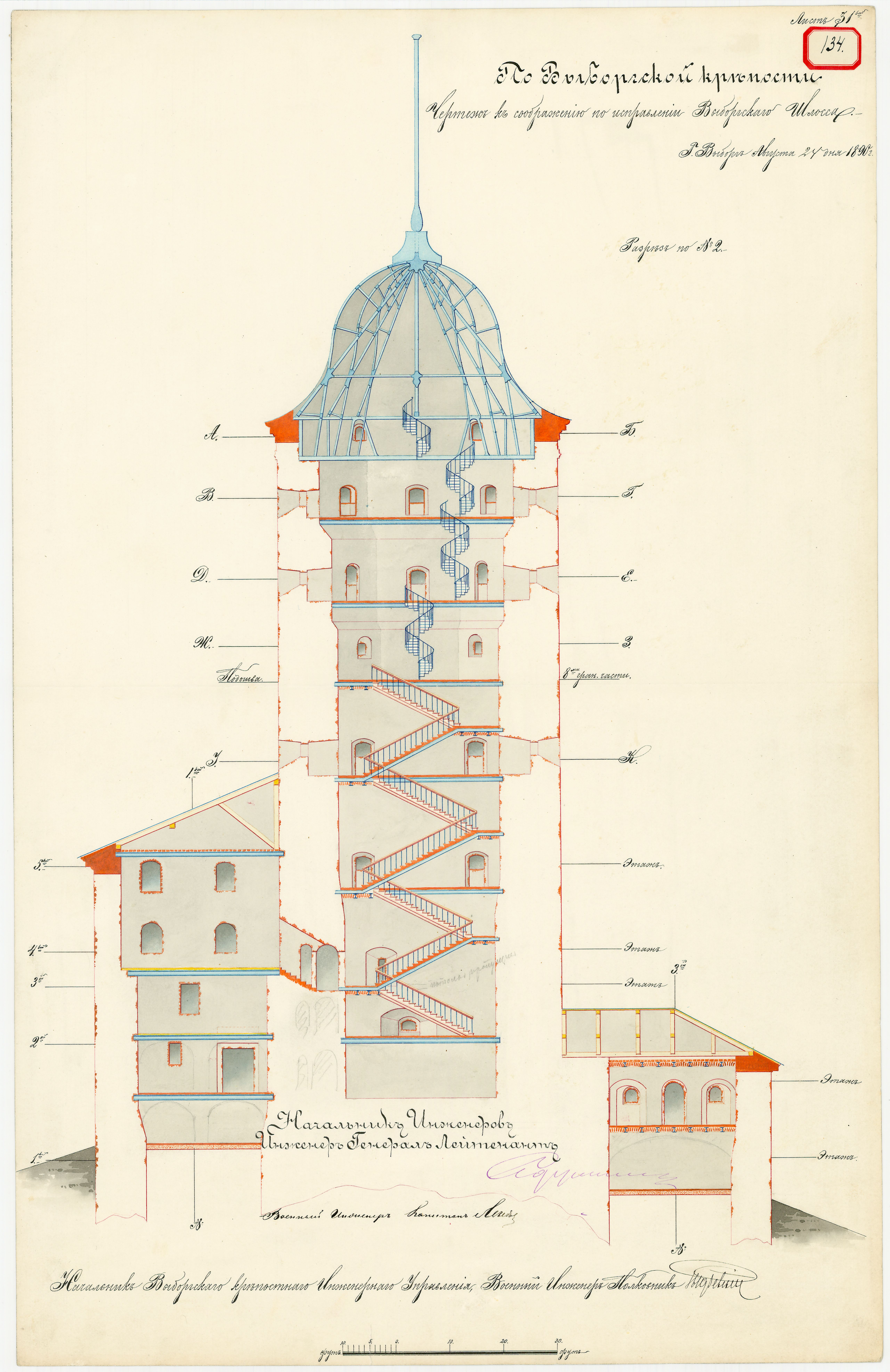 Национальный архиве Финляндии. Выборгская крепость. Выборгский замок. Вертикальный разрез башни. План городского ремонта. 1890-1890 (135) Составлен поручиком М.Н. Кирилловым 24 августа 1890 г.